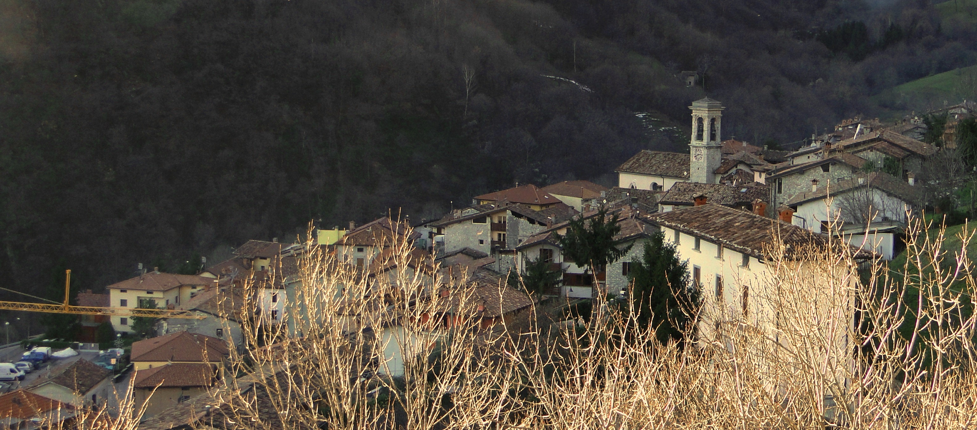 Panorama di Olera, fraz. di Alzano Lombardo (BG), Italy.